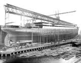 Construcción del Alberta.